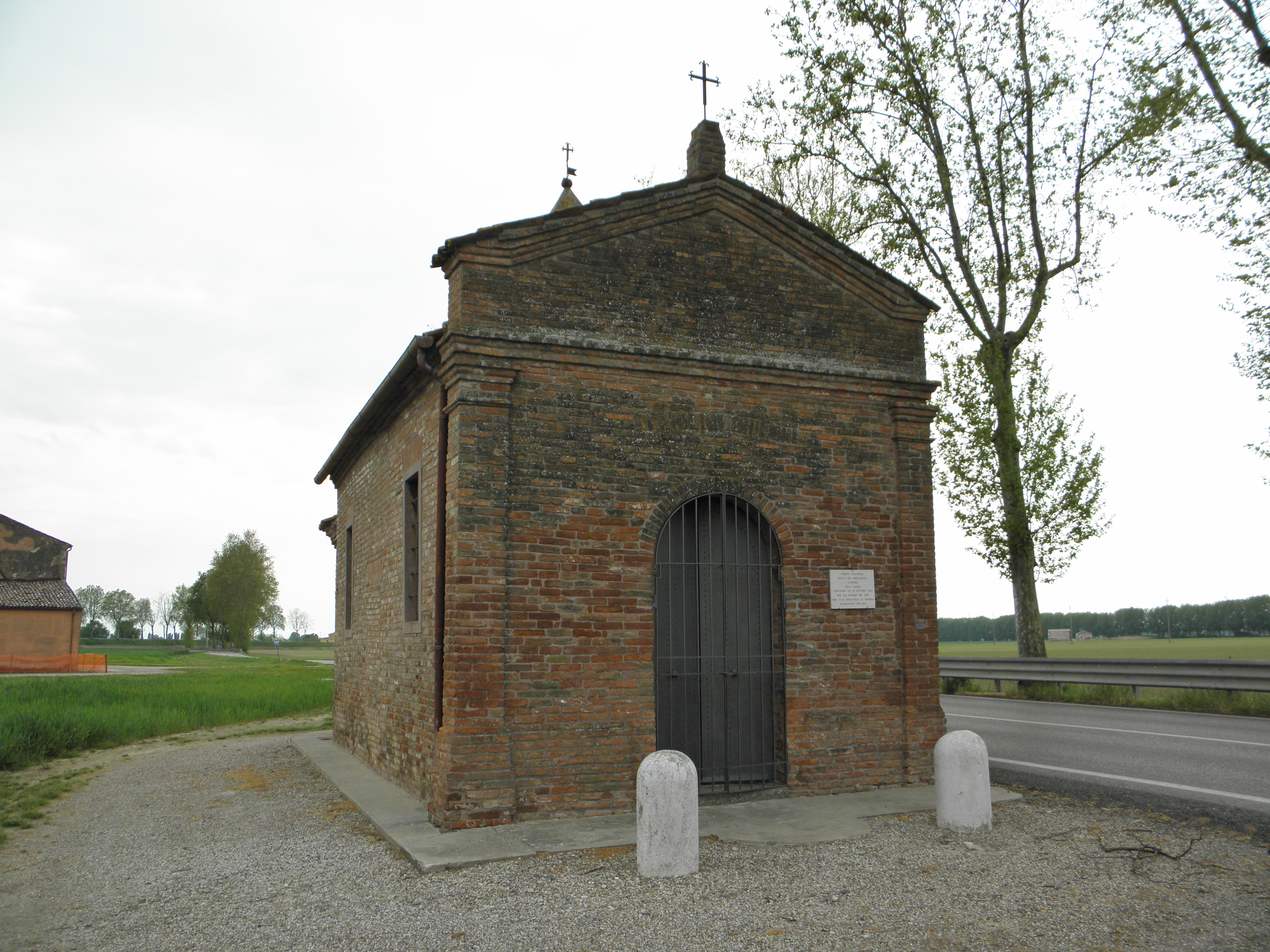 Ponte Rodoni, frazione di Bondeno: l'oratorio del Marzaiolo.